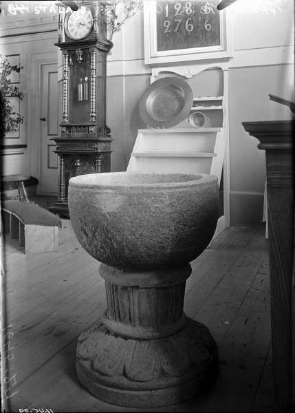 Dopfunt av täljsten. 1200-talet. Snabbinv. Kategori: (04) DopfuntarDopfunt av täljsten. 1200-talet. Snabbinv.